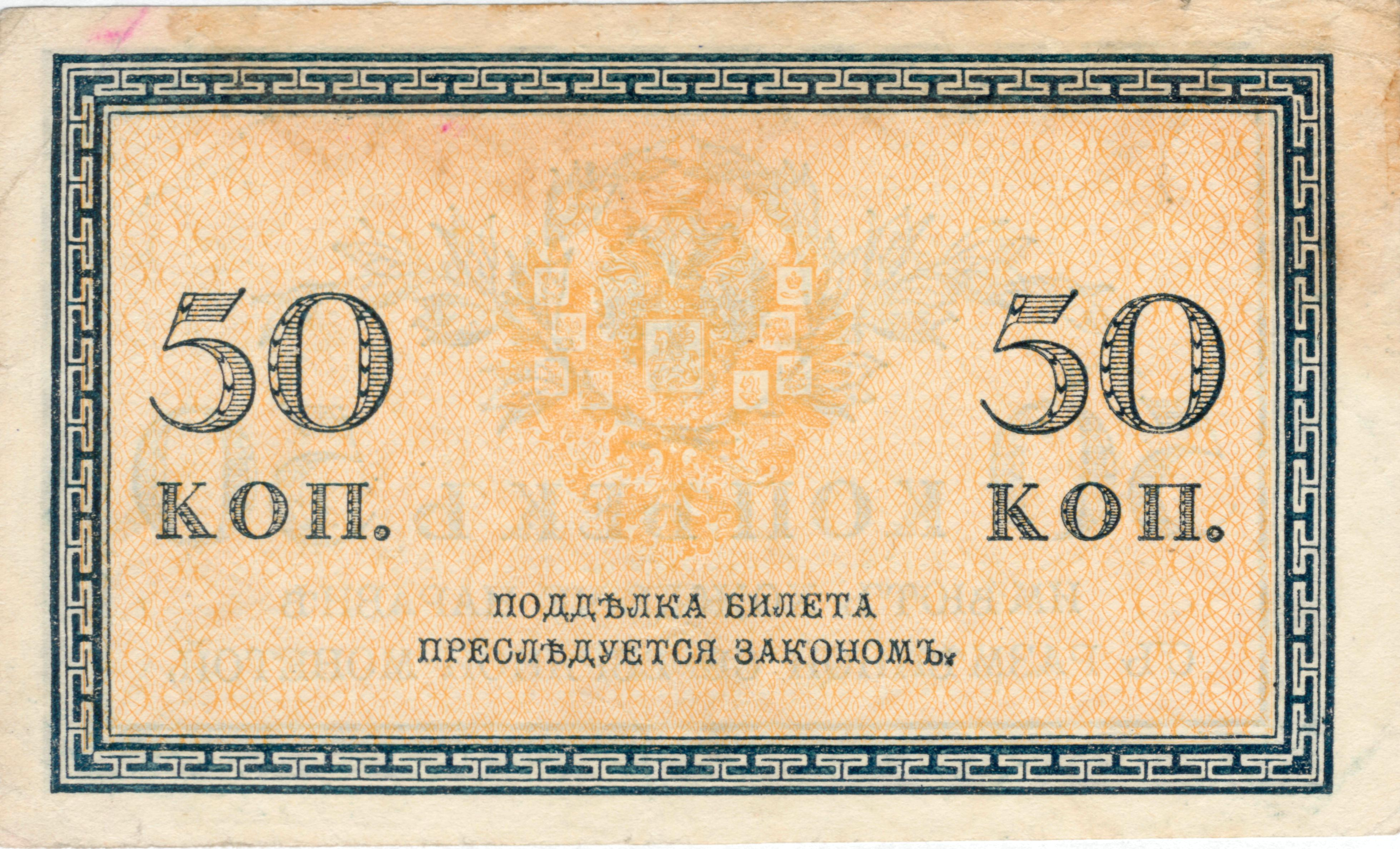 50 копеек Николая Второго. Реверс